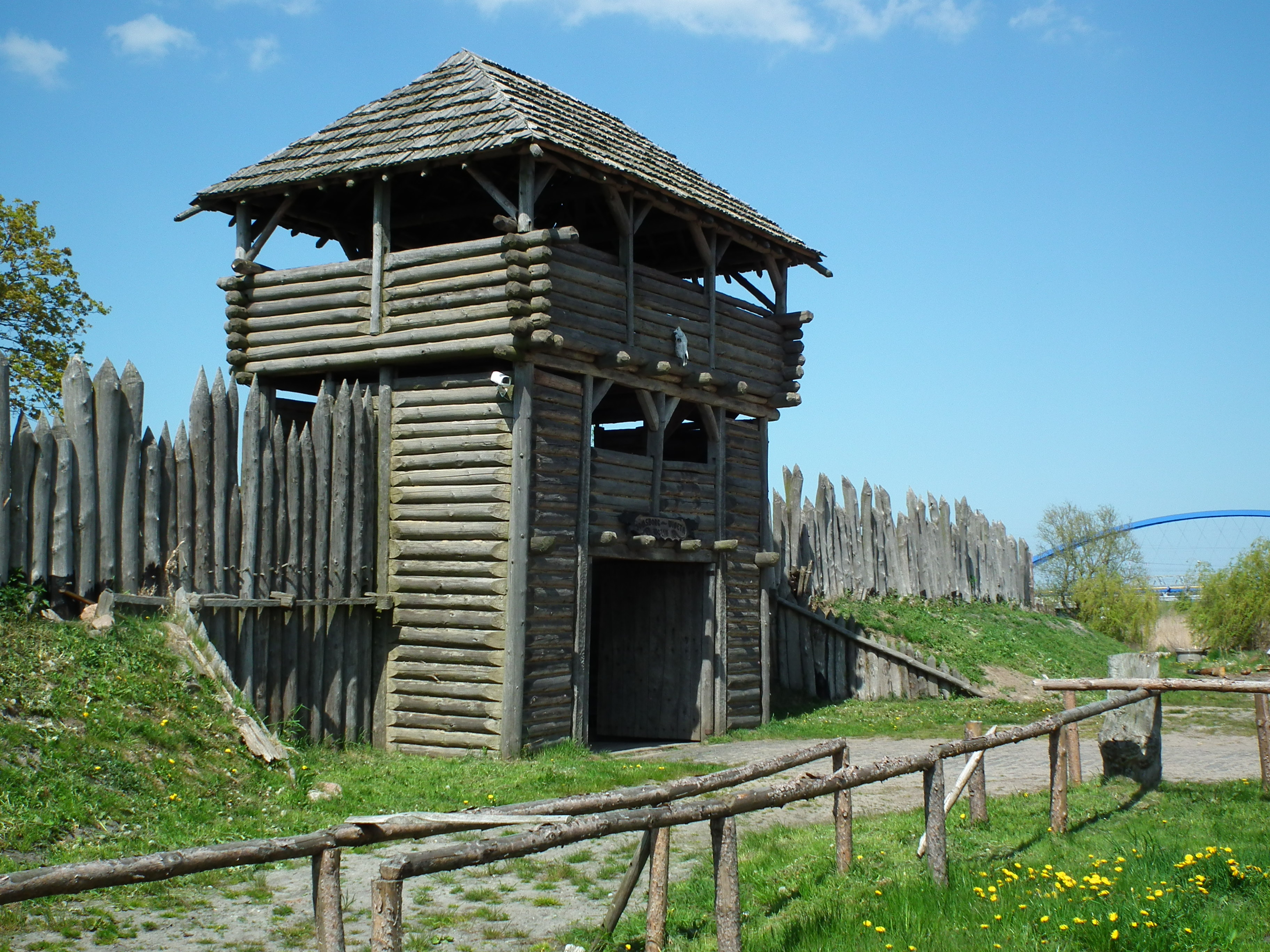 Centrum Słowian i Wikingów w Wolinie-Recławiu.